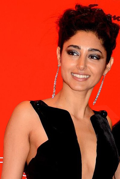 Golshifteh Farahani à la cérémonie des César